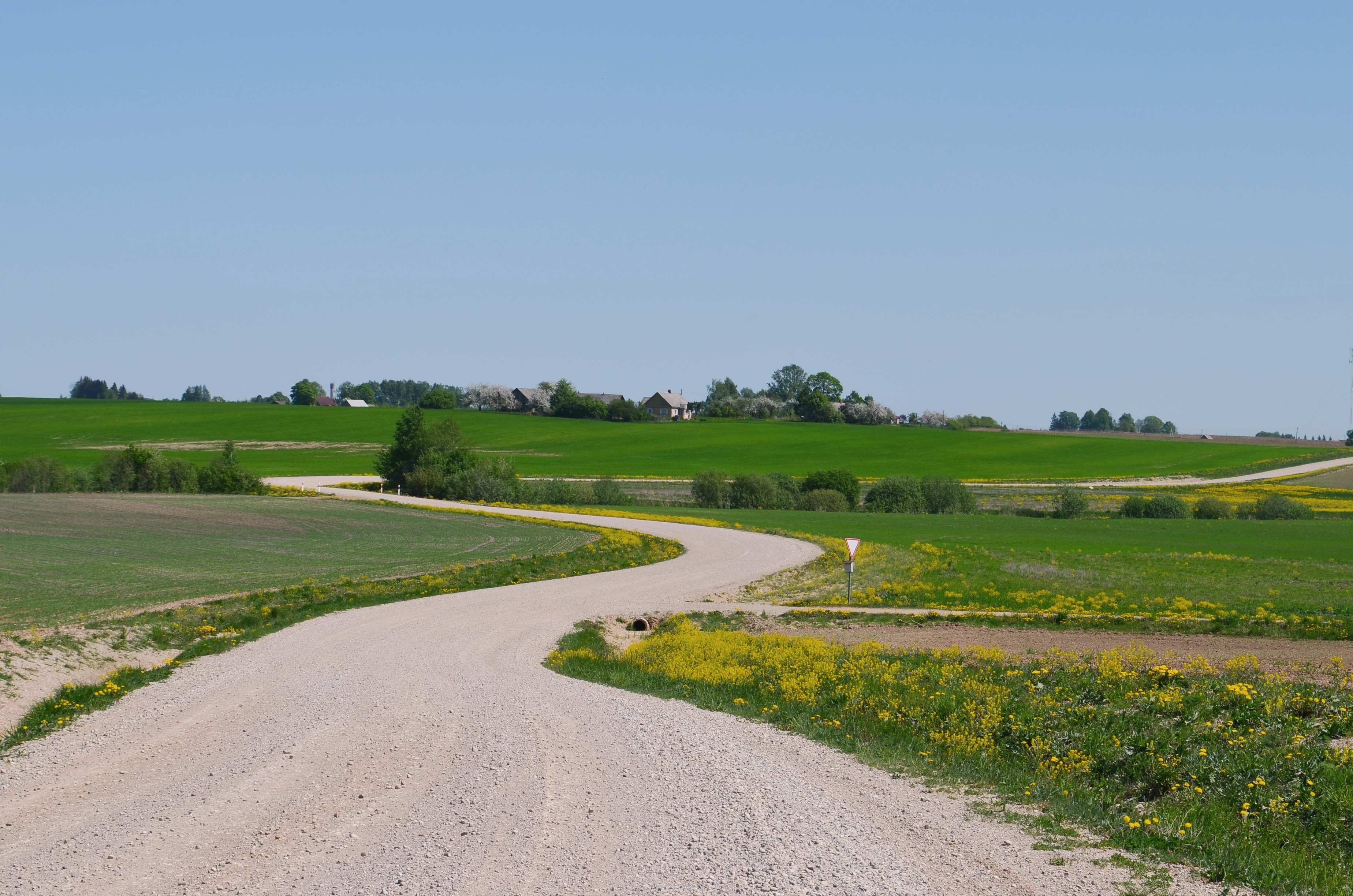 Papragiai, Kavarsko sen., Anykščių raj.